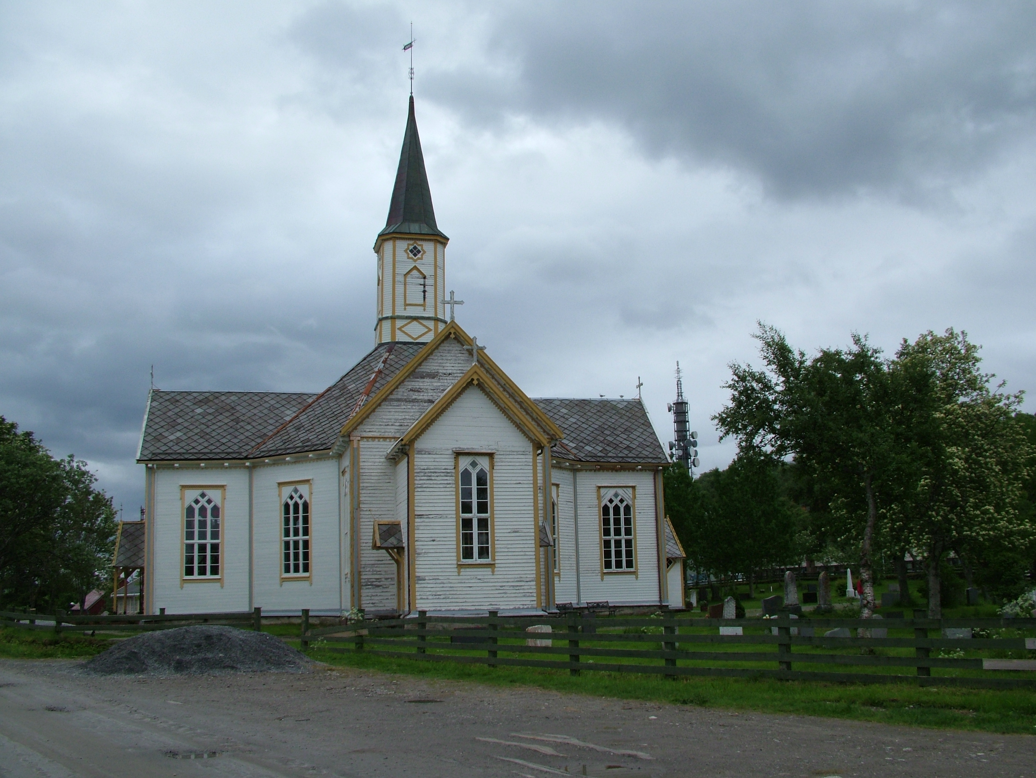 Sandnessjøen in Norwegen. Die Kirche im Ort wurde 1881 fertiggestellt.